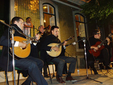 Verdes Anos fado group